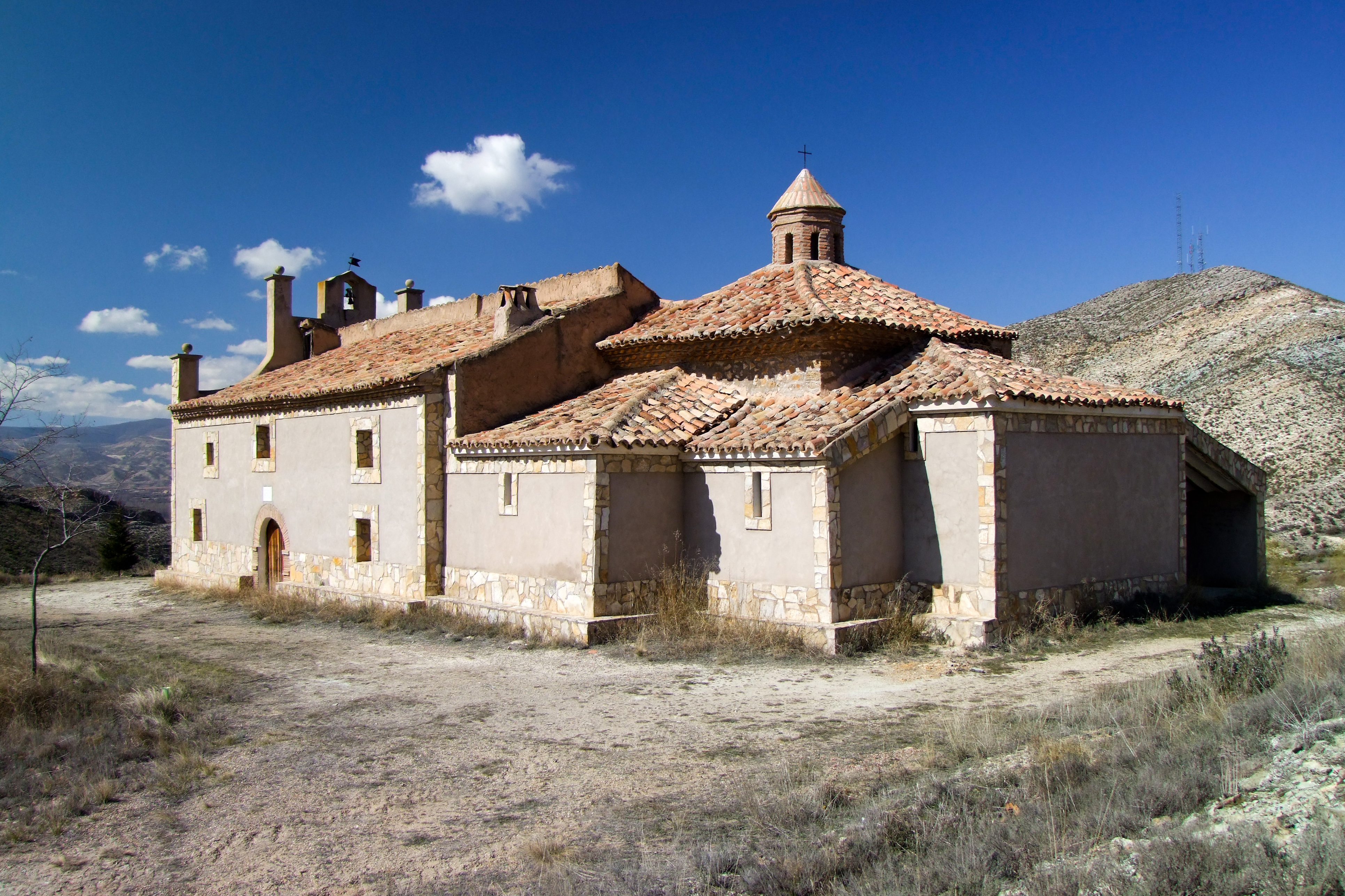 Ermita de la Virgen del Prado en la localidad de Inestrillas, La Rioja - España